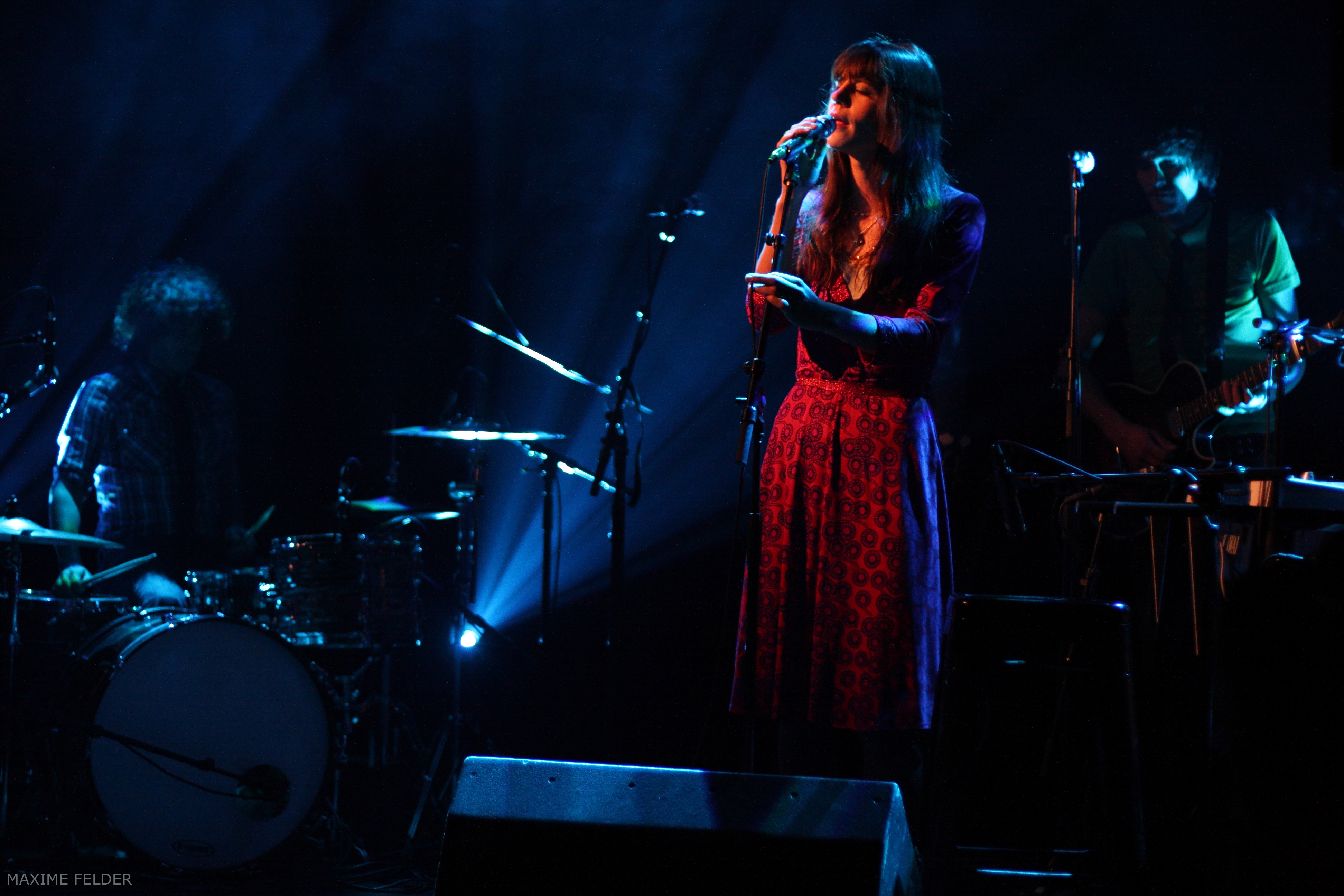 Marie Modiano, chanteuse française, en concert à Fri-Son, Fribourg, Suisse.